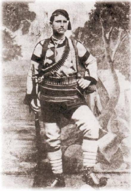 Иван Тодев Белял Чауш.